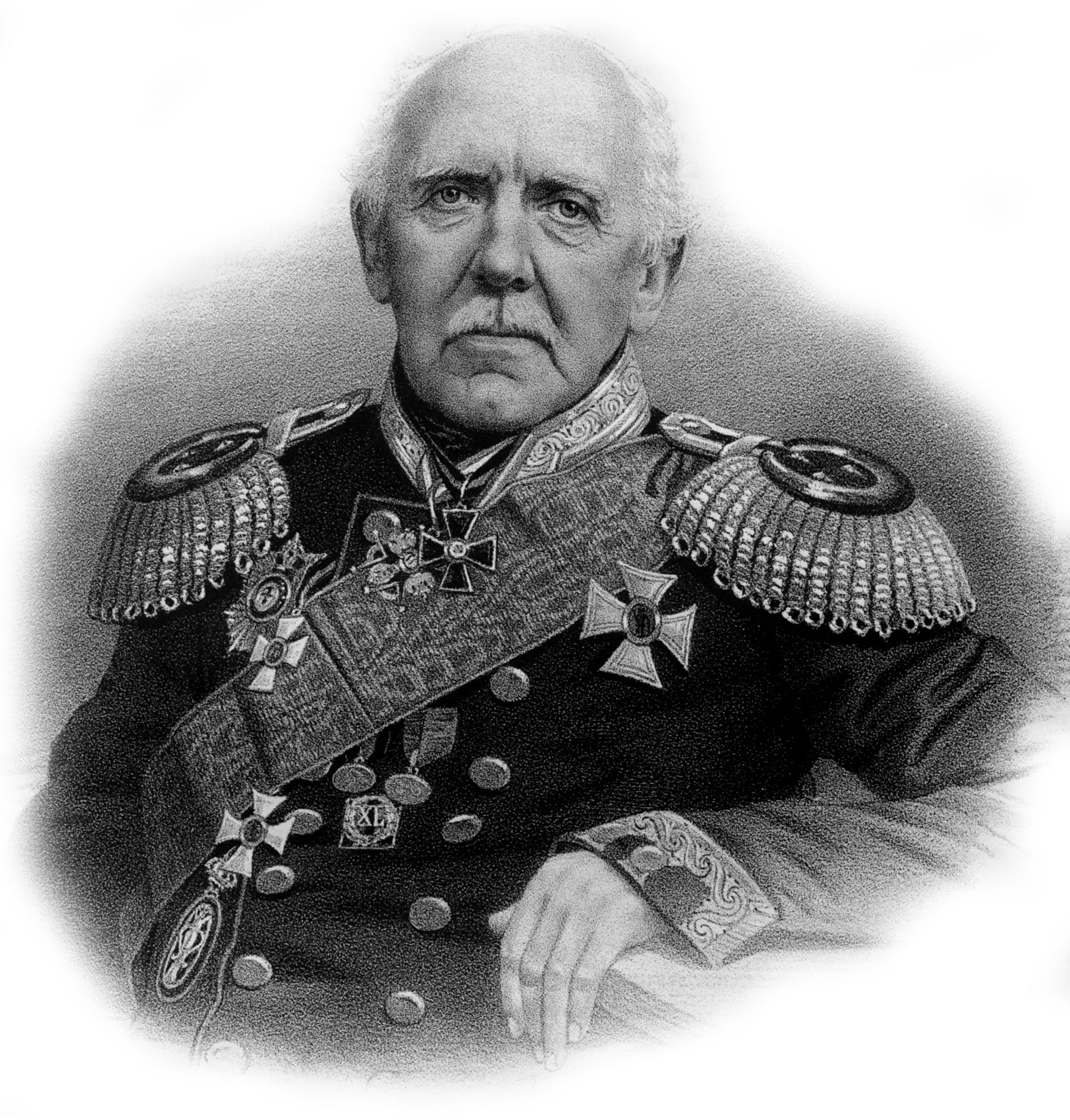 E. BOUIALSKY. Съ Фотографiи. Лит. А. Мюнстера, СПБ. Imp. Lith. A. Munster (Editeur)